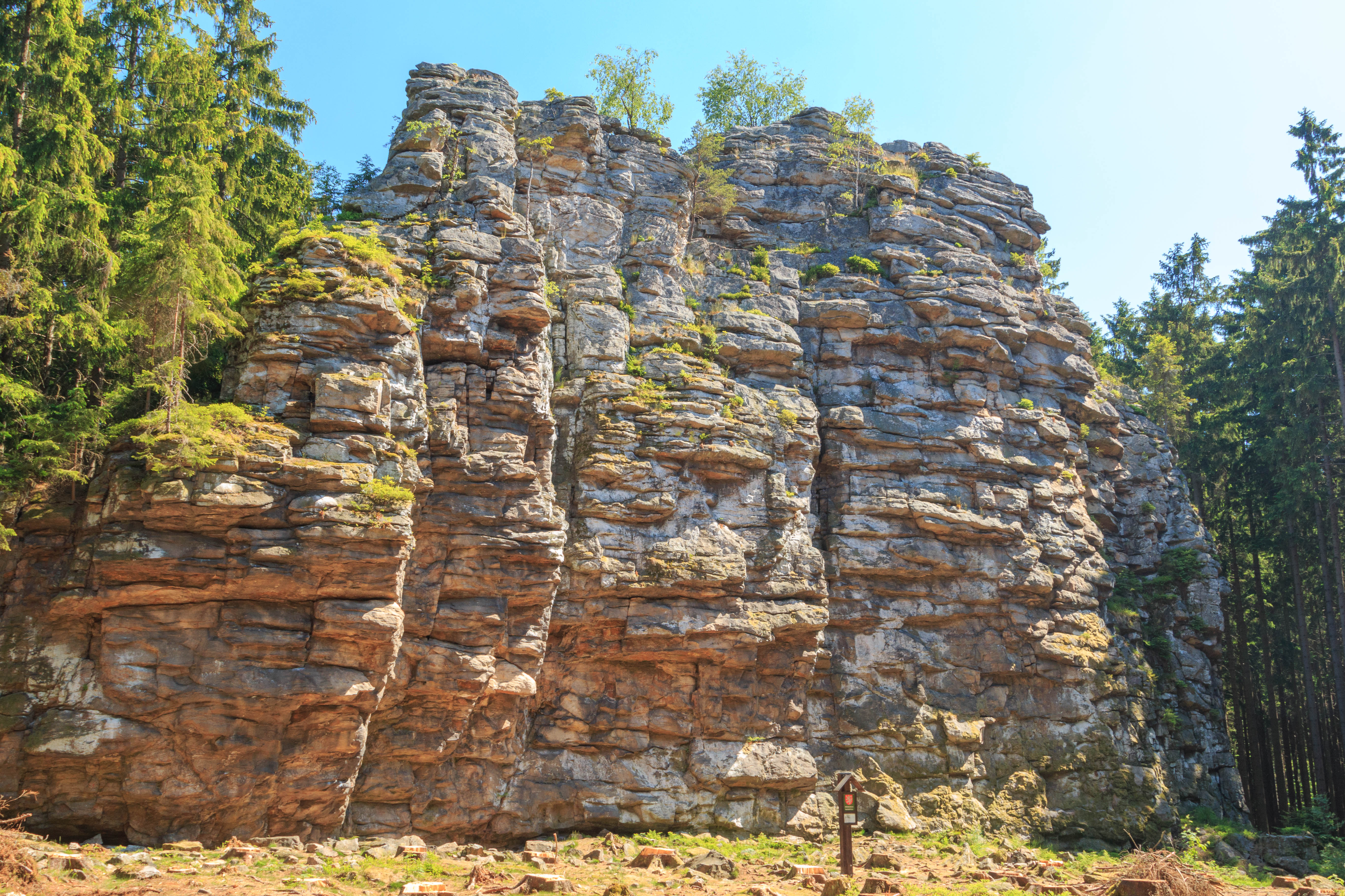 Přírodní památka Bílá skála (Žďárské vrchy) Project: Chráněná území.